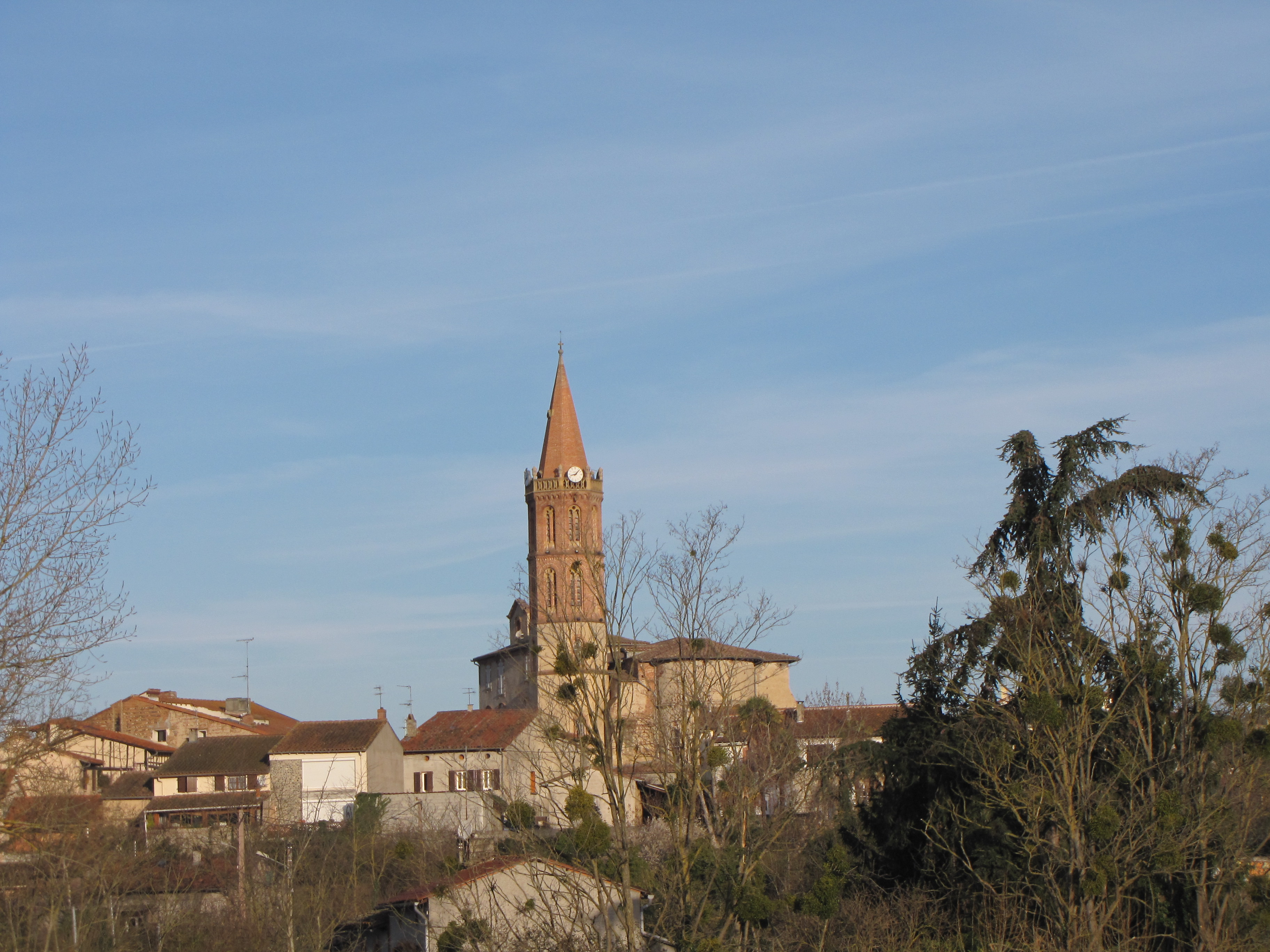 Noé (Haute-Garonne)